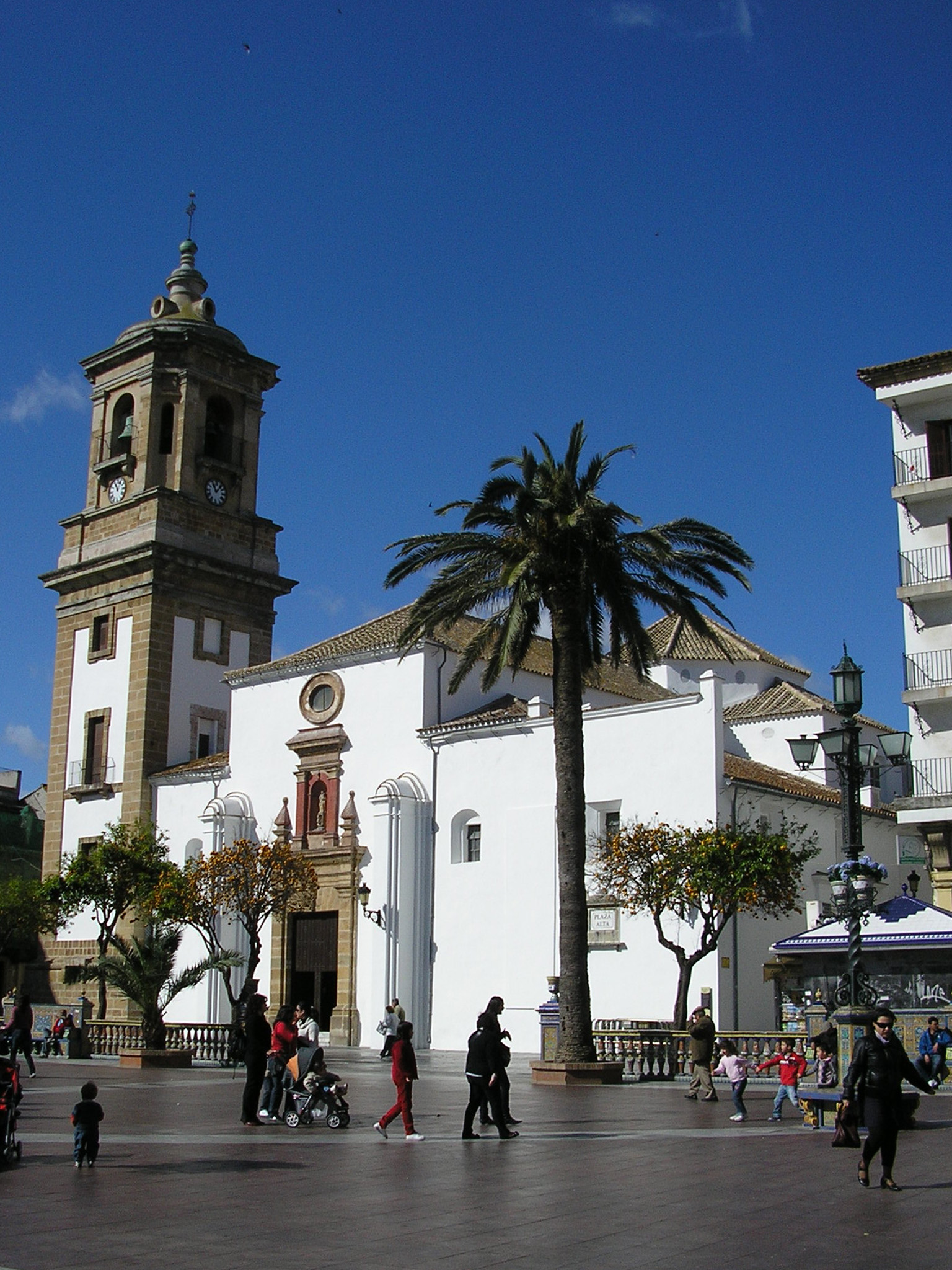 Plaza Alta de Algeciras, vista de la Iglesia de Nuestra Señora de La Palma, Andalucía, España